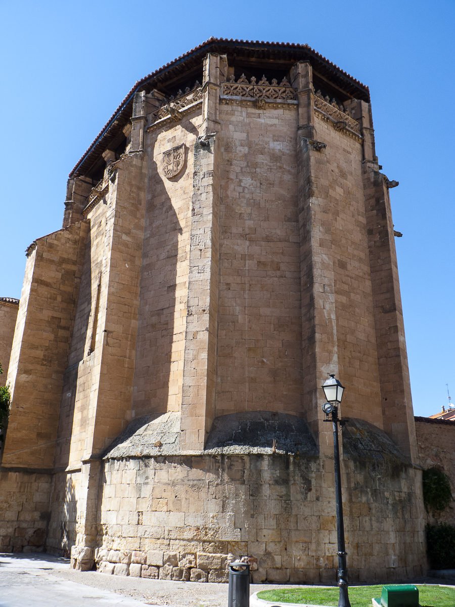 02082013 172135 SALAMANCA 0035